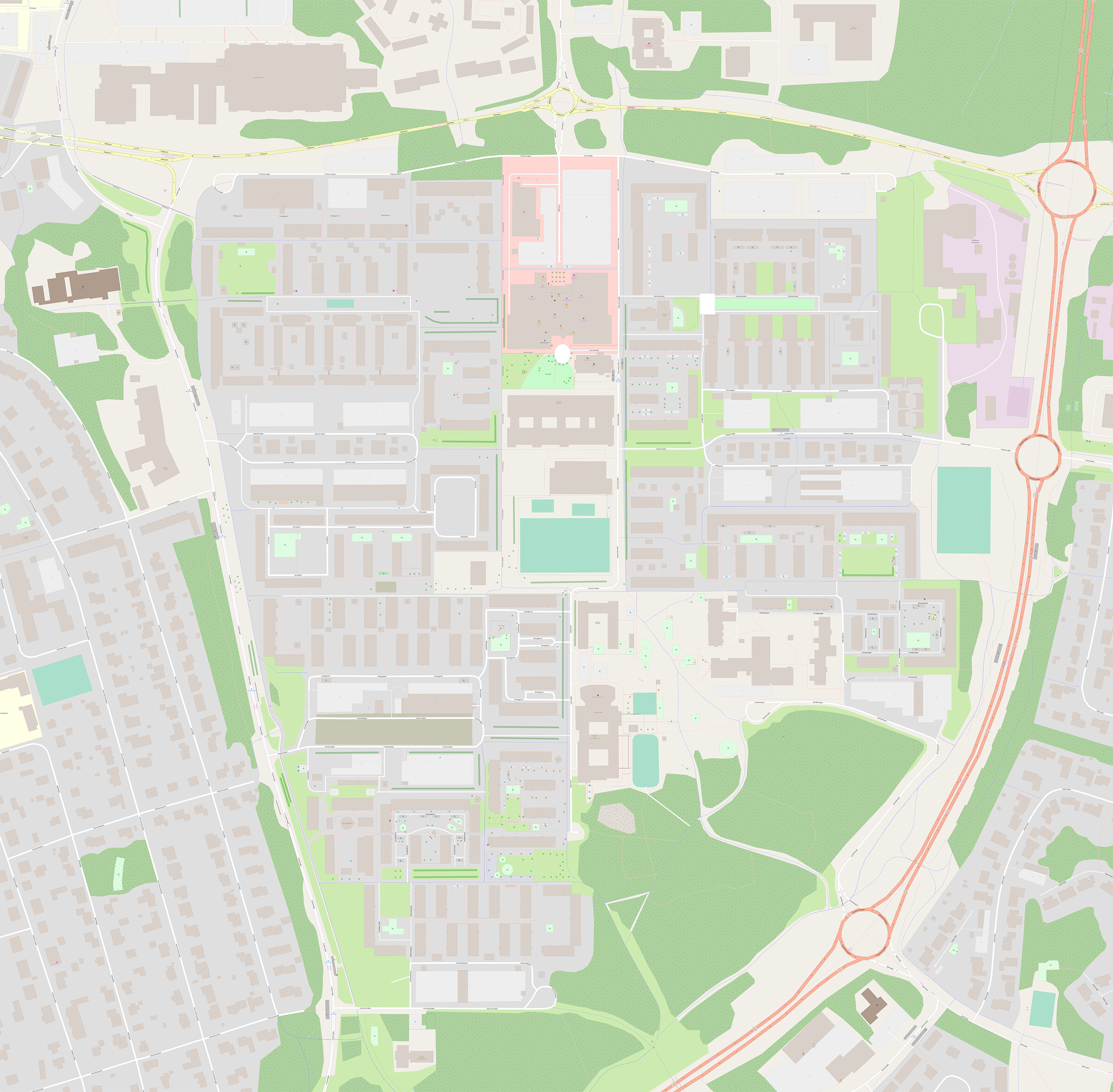 Denna karta över Ålidhem skapades med data från det fria kartprojektet OpenStreetMap. Kartan kan vara ofullständig eller innehålla fel. Använd den inte som enda källa för att hitta någonstans.